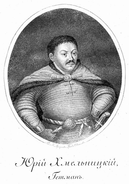 Jurij Chmielnicki, Ukrainian hetman of Zaporoze , son of Bohdan Chmielnicki